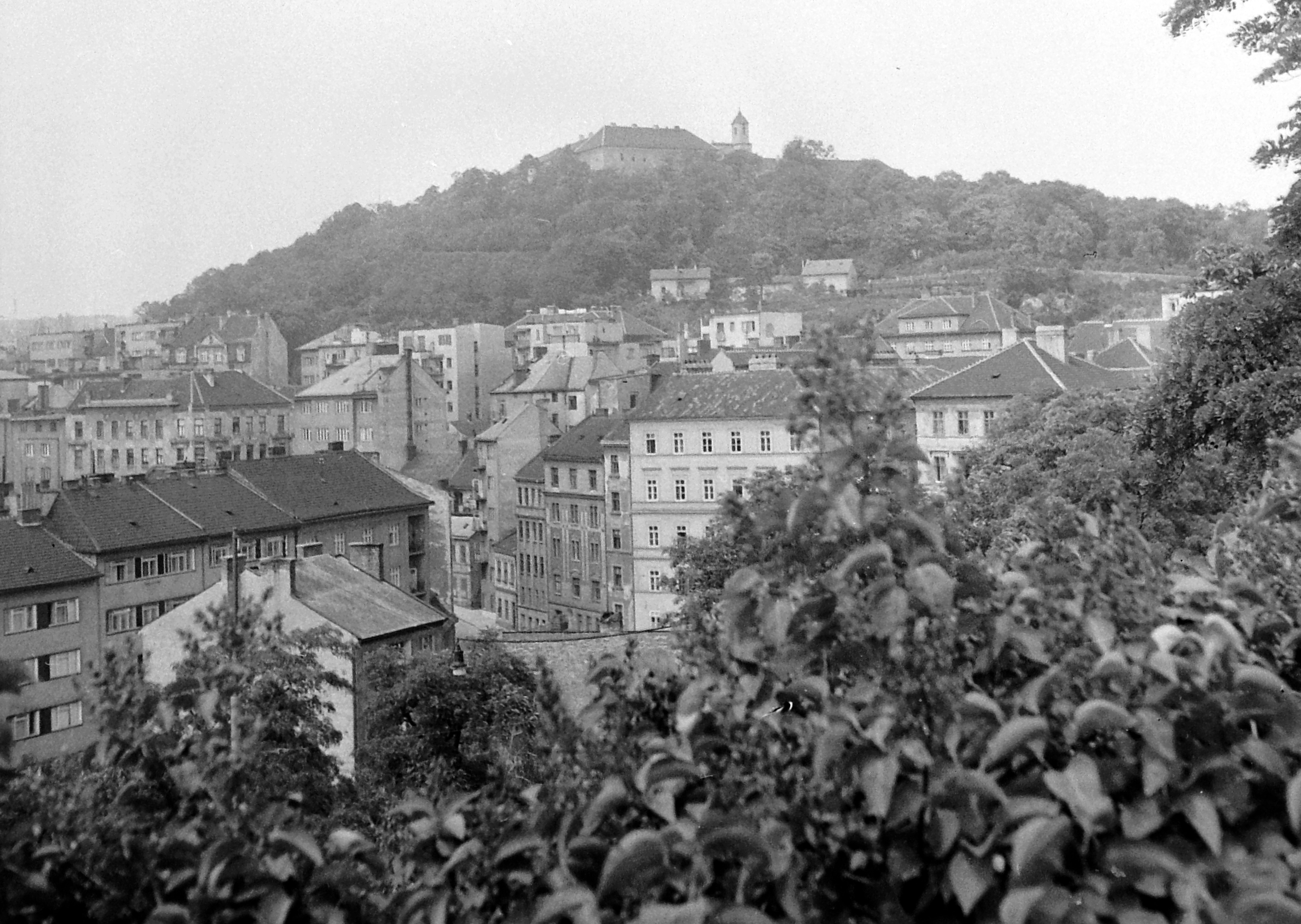 látkép, háttérben a Spilberk vár. Location: Czech Republik, Brno Tags: Czechoslovakia Title: látkép, háttérben a Spilberk vár.